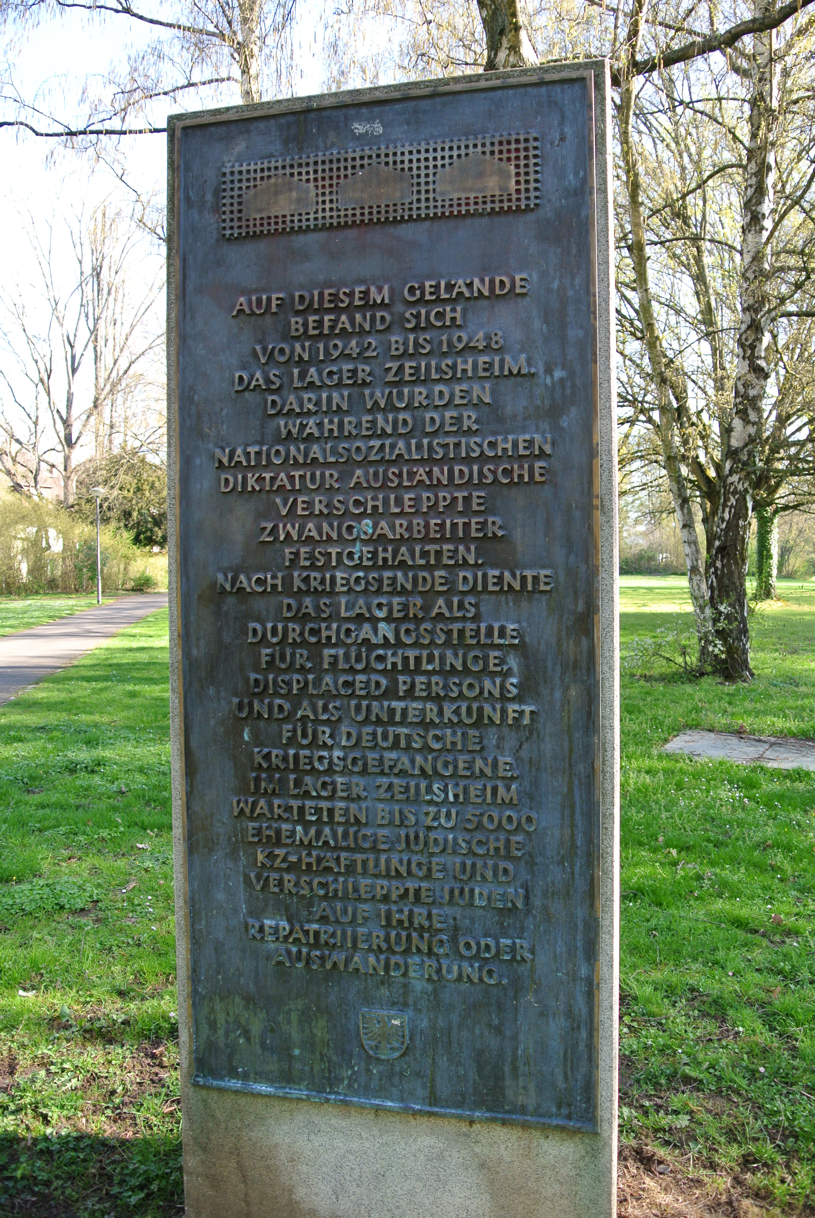 Lager für Zwangsarbeiter während der Zeit des Nationalsozialismus und nach Kriegsende Lager für Displaced Persons